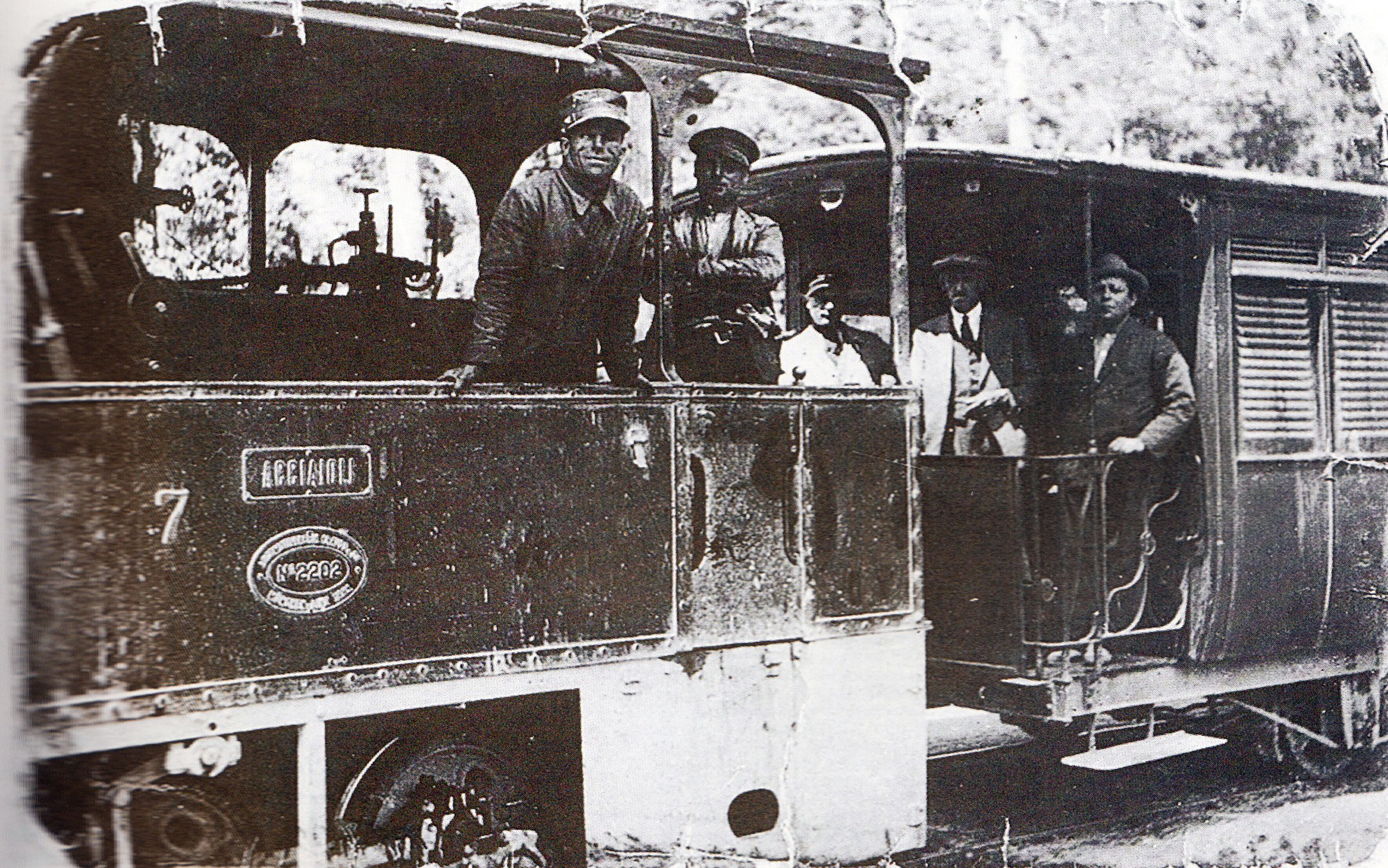 La locomotiva N.7 Acciaioli in servizio sulla tranvia del Chianti, con alla guida il macchinista Giovanni Furini e il fuochista Giovanni Barucci